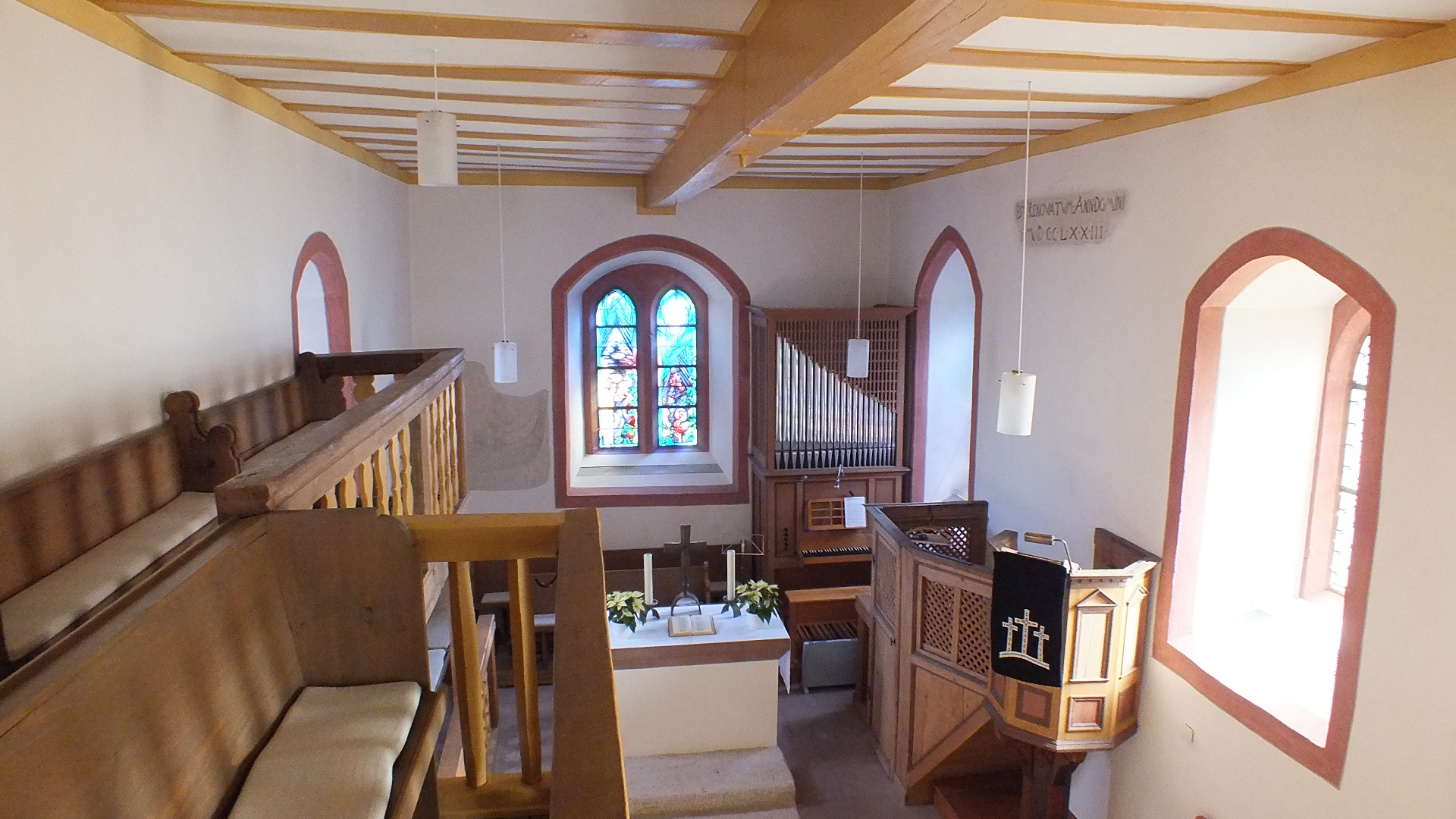 Evangelische Kirche Launsbach, Gemeinde Wettenberg, Landkreis Gießen, Hessen, Deutschland